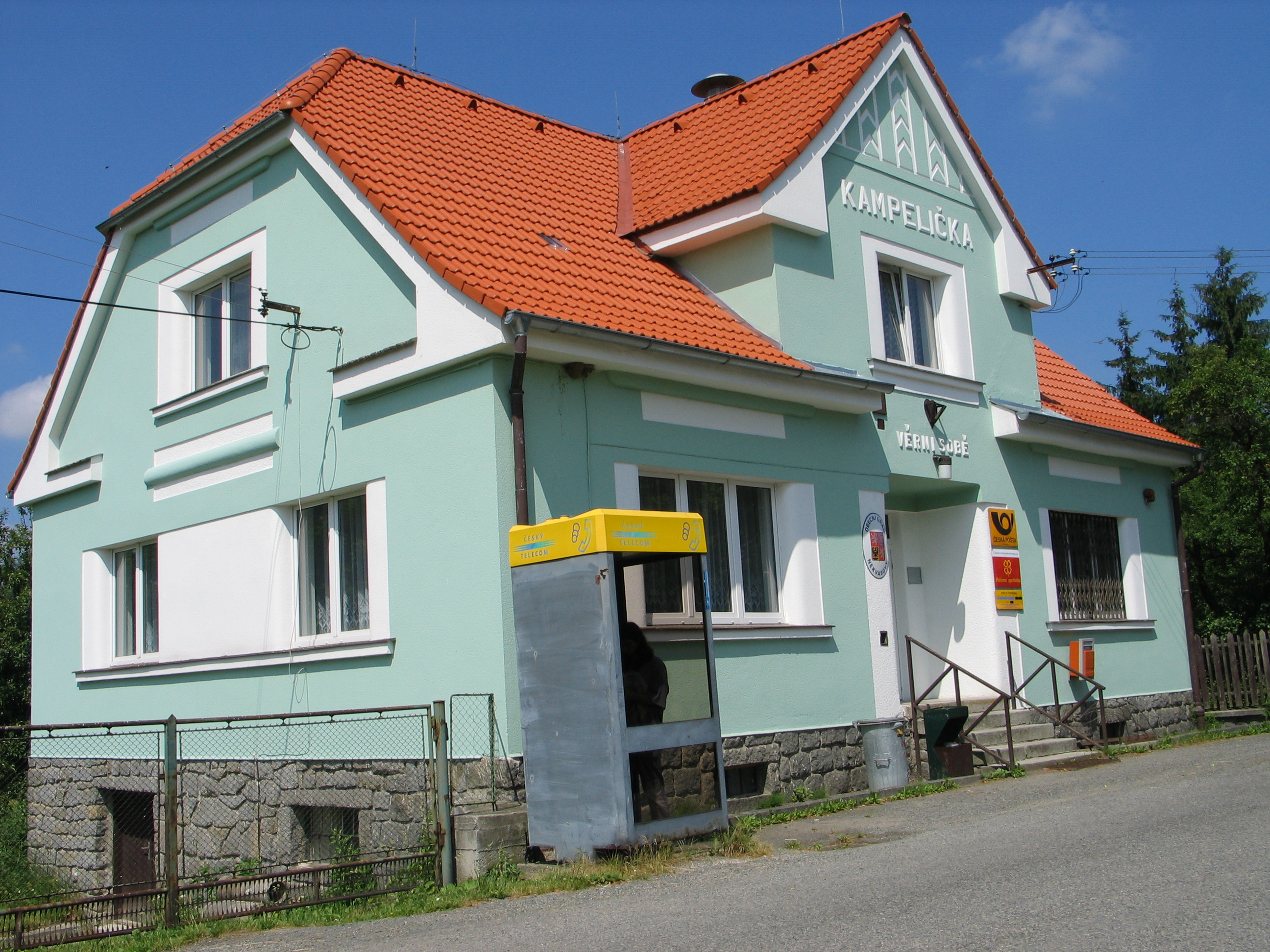 Nekvasovy - village in western Bohemia